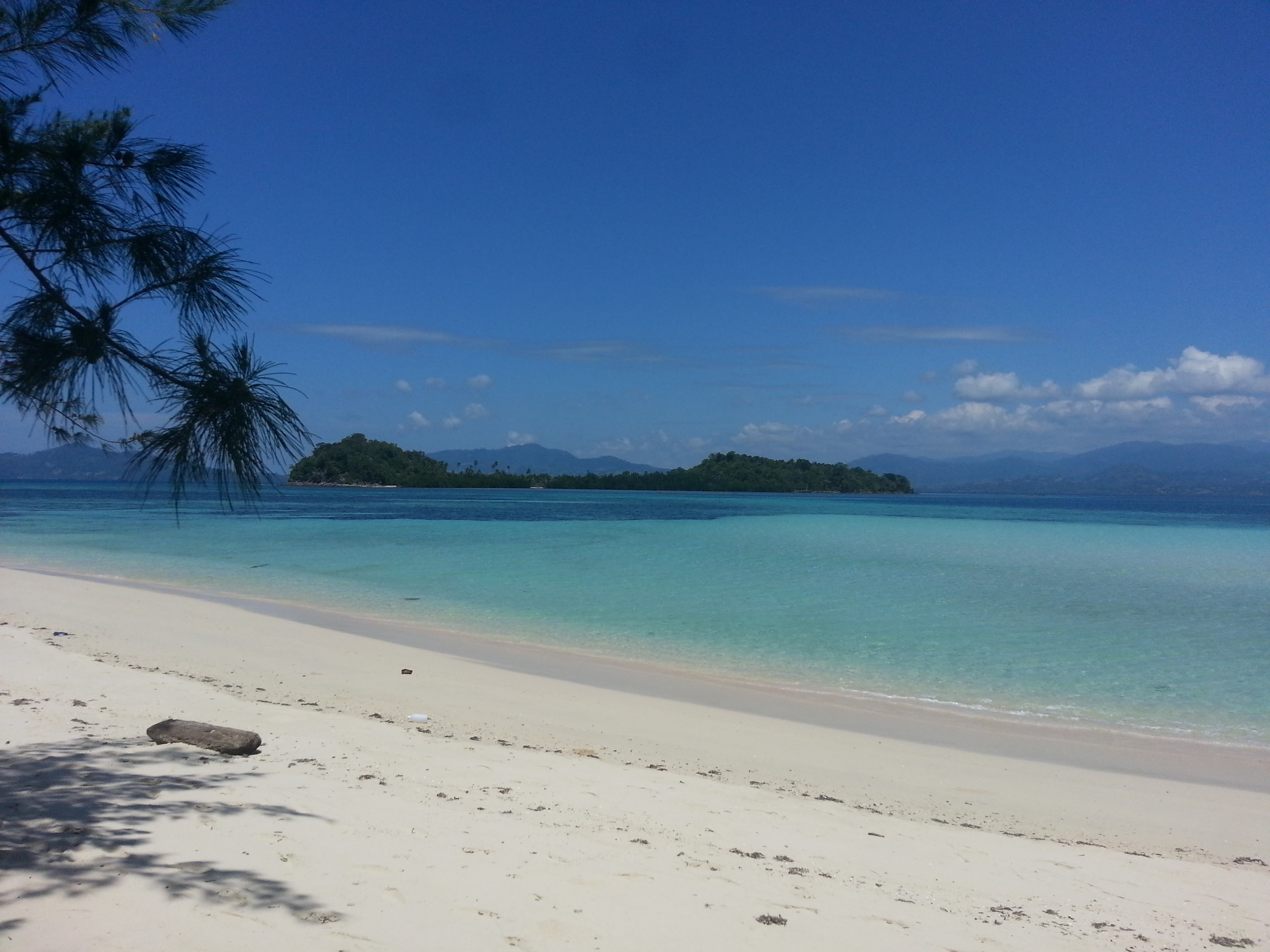 Pulau Saronde Kab. Gorontalo Utara Prop. Gorontalo